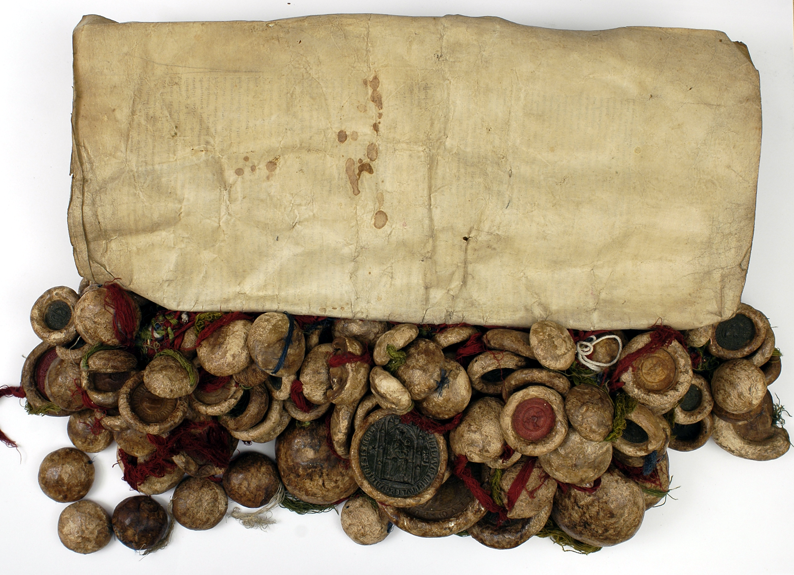 Paweł von Rusdorf, wielki mistrz zakonu krzyżackiego, zawiera pokój z Władysławem Warneńczykiem, królem polskim, Zygmuntem Kiejstutowiczem, wielkim księciem litewskim i innymi. Przy dokumencie przywioszone 163 pieczęcie.